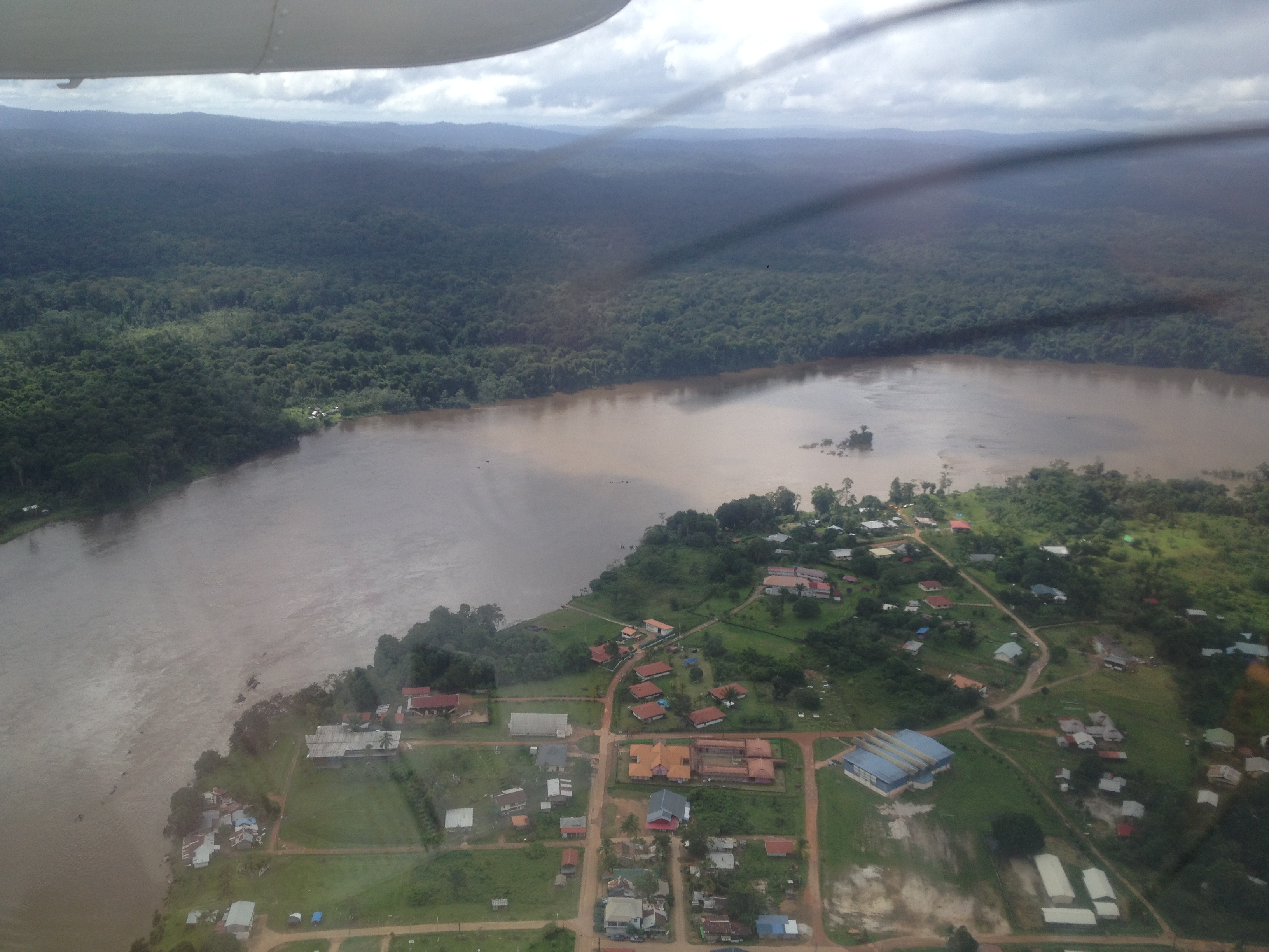 Vue aérienne de Maripasoula et de la rivière Lawa, frontière entre la Guyane Française et le Surinam